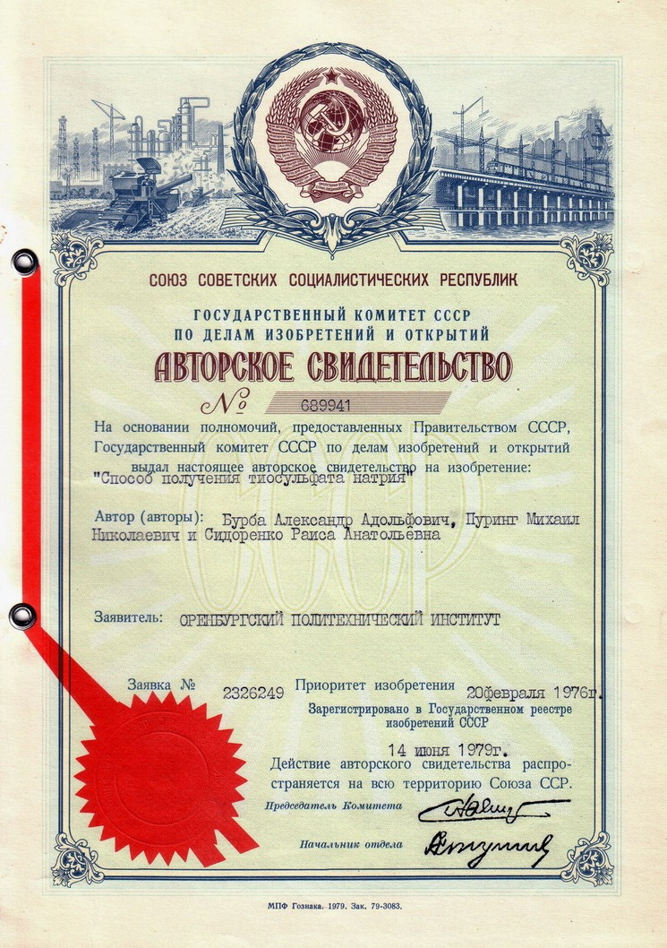 Одно из авторских свидетельств А. А. Бурбы (1976).